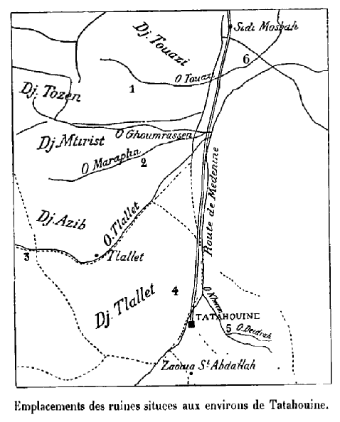 Emplacements des ruines situées aux environs de Tatahouine. 1 Castellum romain. 2 Ruines d'un établissement agricole (Ksar Chouline ?). 3 Castellum romain de Rais-el-Aïn (Talalati). 4 Vestiges d'une petite agglomération. 5 Tombeau. 6 Ruine d'une ferme.